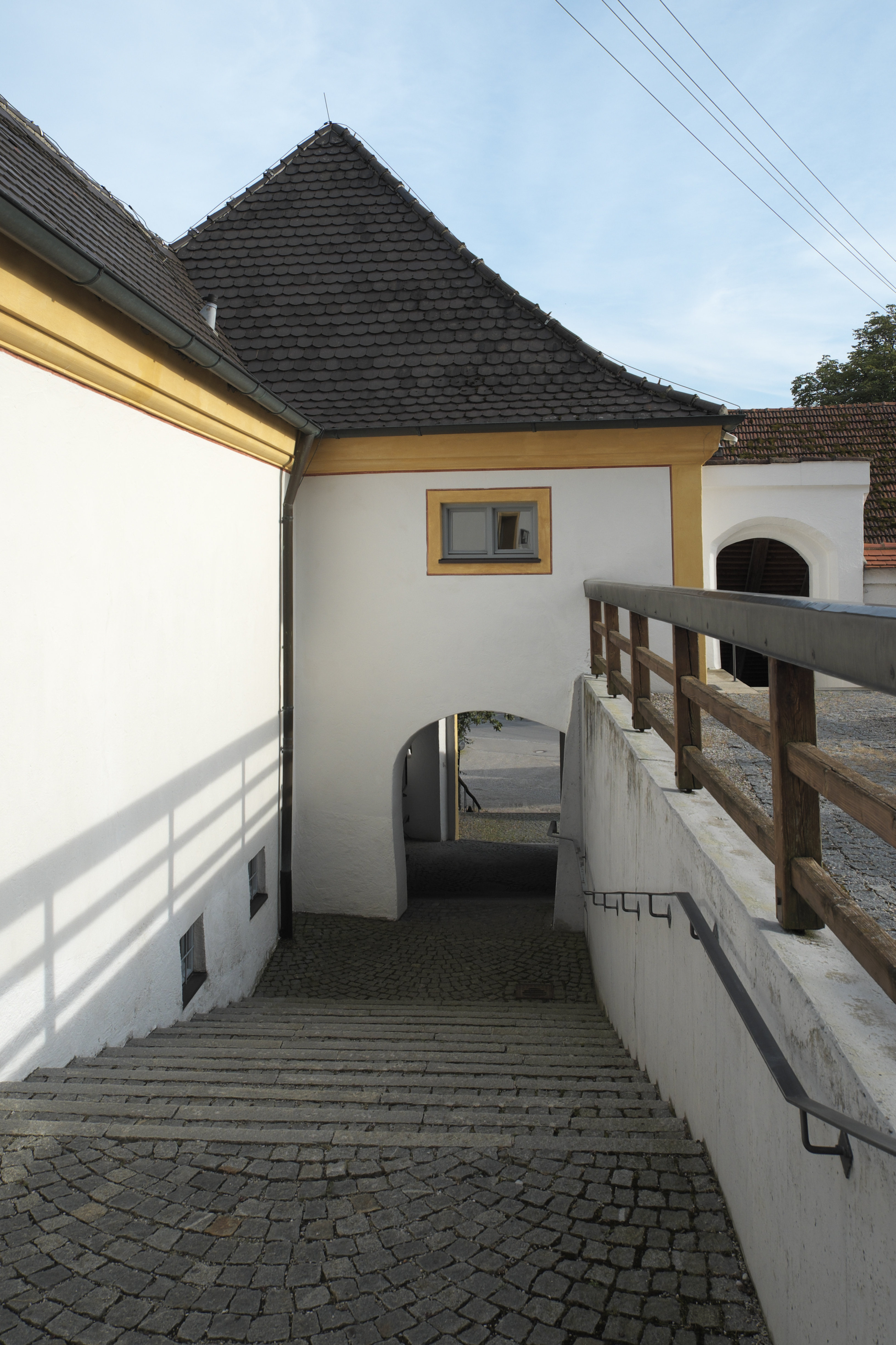 Torhaus der Friedhofsbefestigung bei der katholischen Pfarrkirche Mariä Himmelfahrt in Walleshausen, einem Ortsteil von Geltendorf im Landkreis Landsberg am Lech (Oberbayern/Bayern)